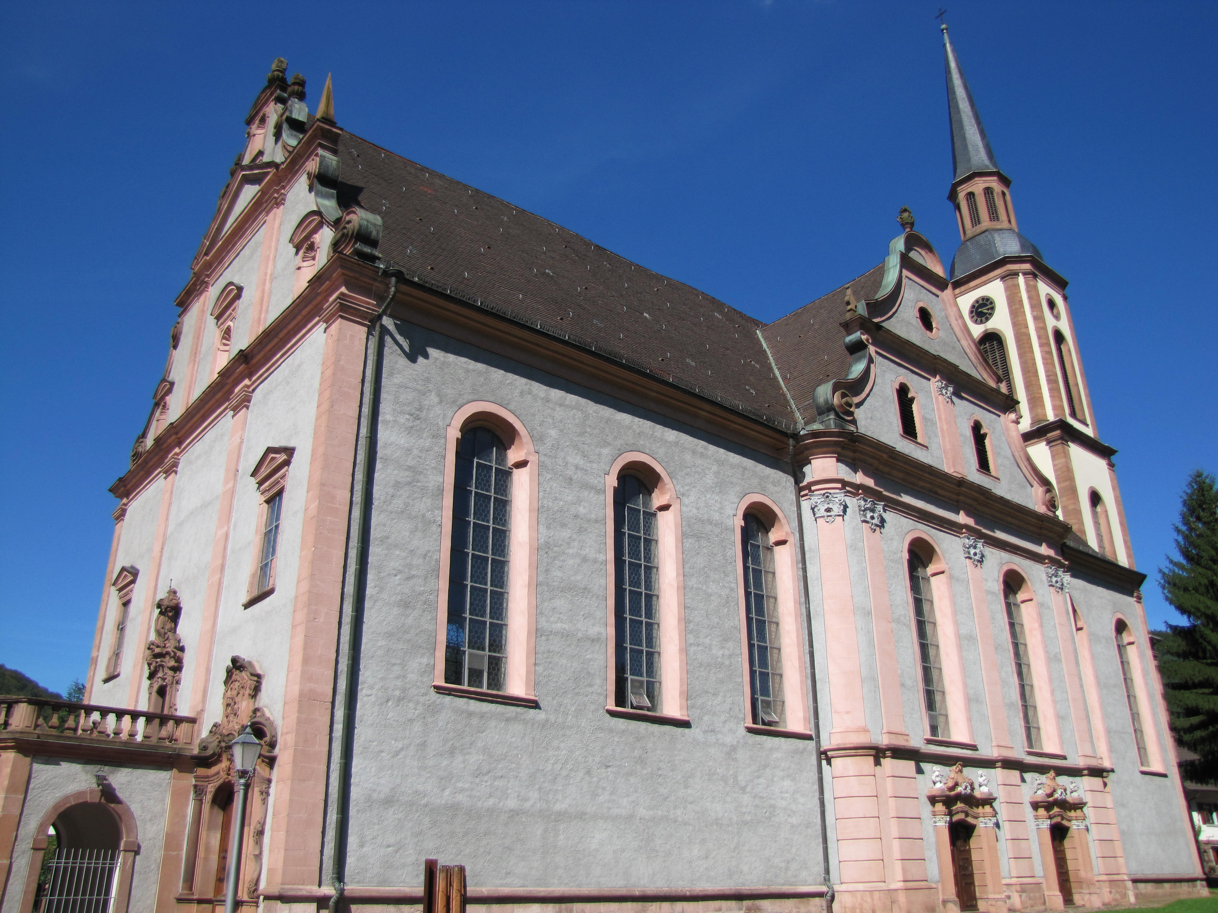 Baden-Württemberg, Ettenheimmünster, Pfarrkirche (Wallfahrtskirche) St. Landelin